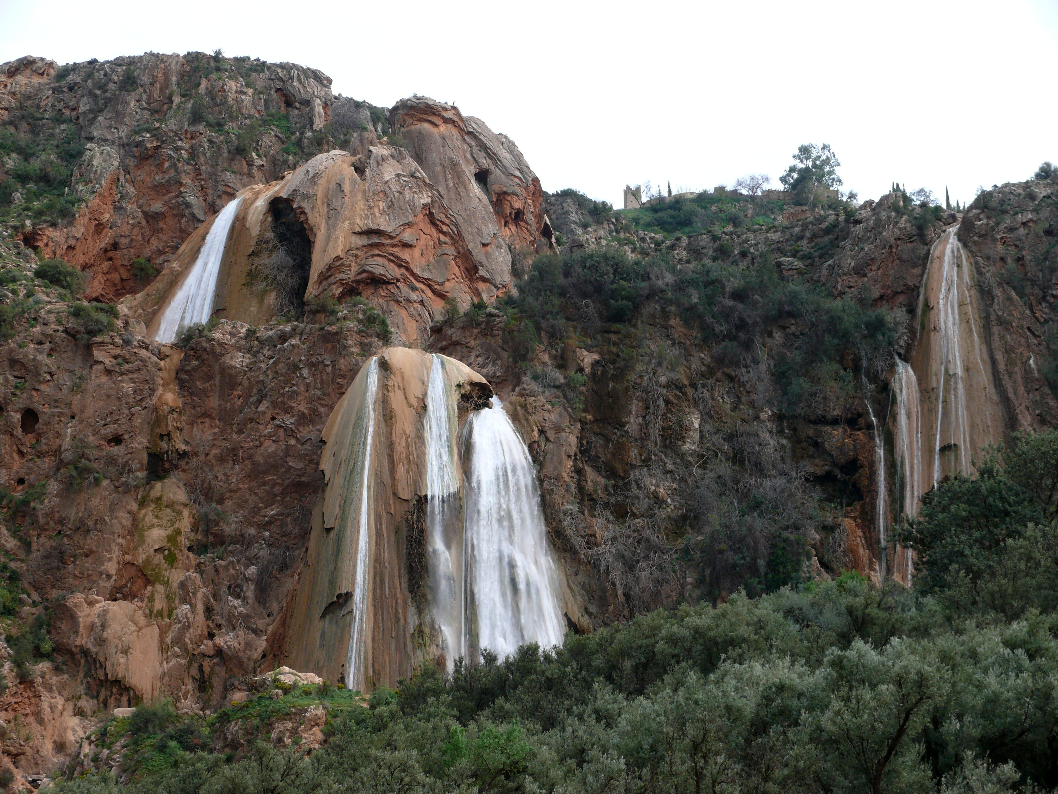 Cascade d'Imouzzer des Ida Outanane (Maroc) dite "Le Voile de la Mariée"